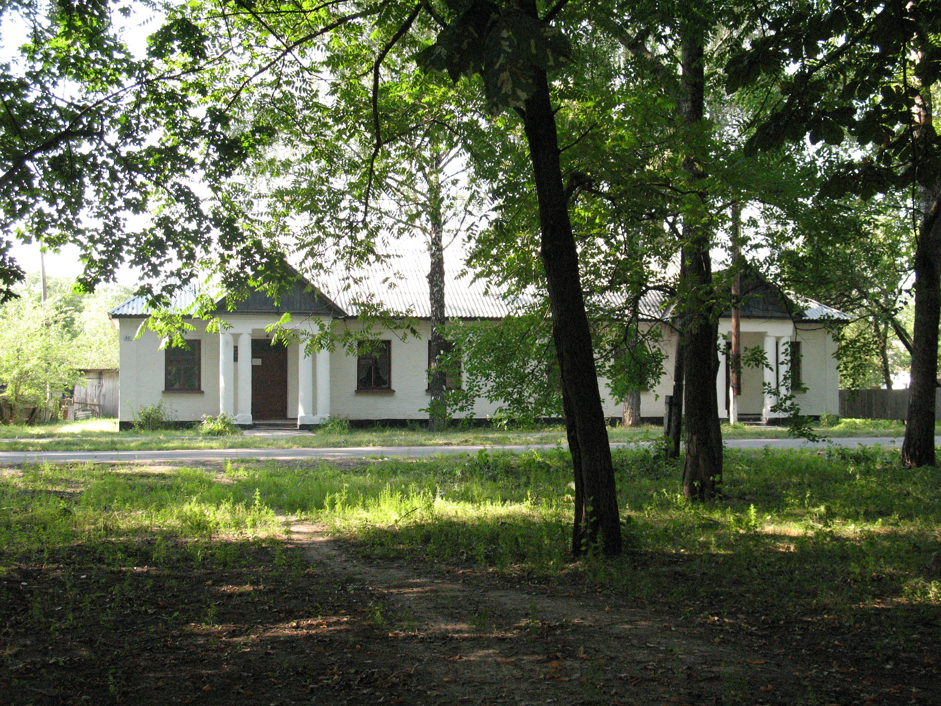 Бібліотека у смт Шрамківка, Драбівського р-ну, Черкаської обл, Україна. Пам'ятка архітектури 30-х років XX століття у стилі сталінізму, будівлі в такому стилі в ті часи будувалися по всій территорії СРСР.